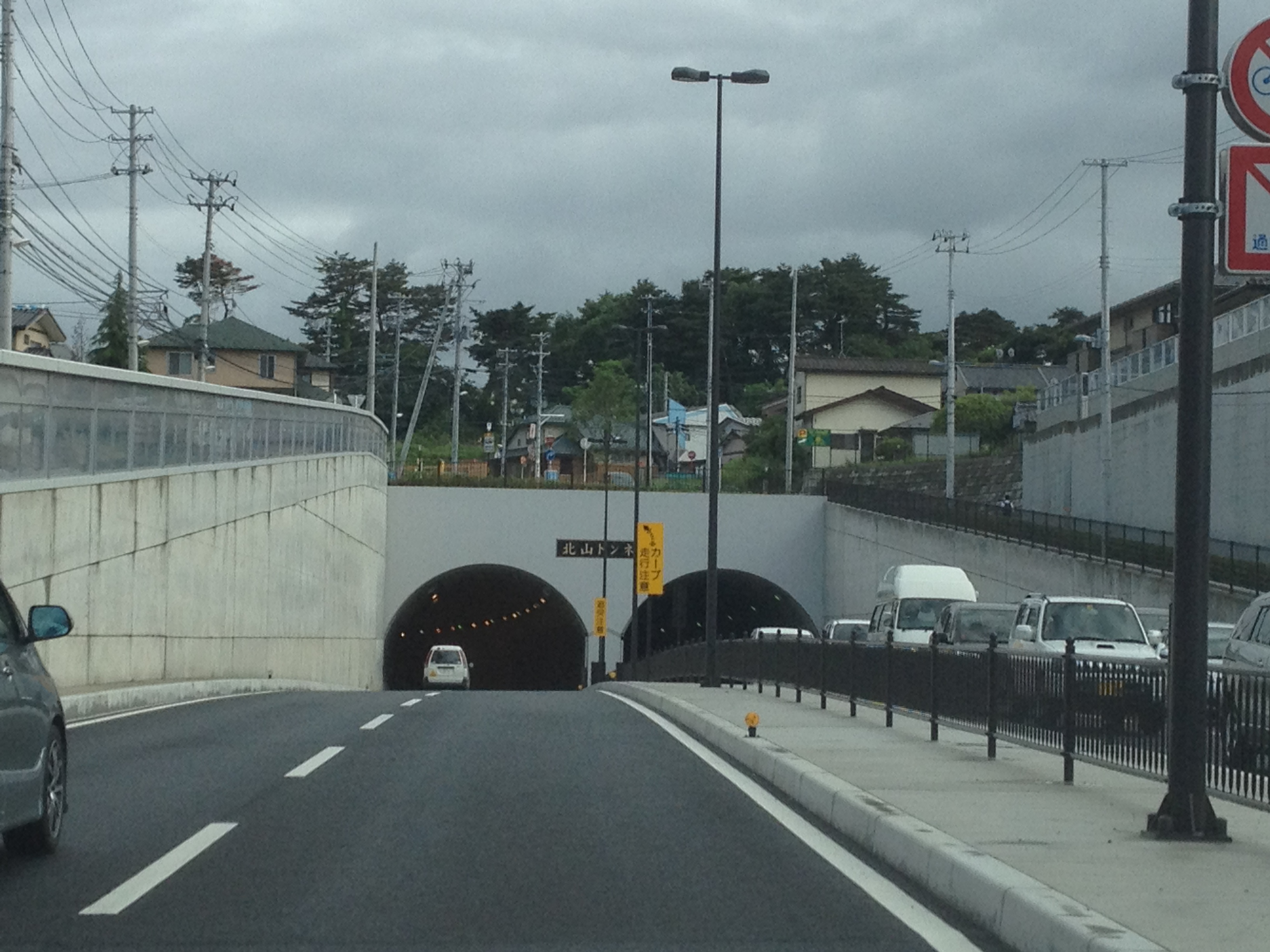 仙台市 北山トンネル北口